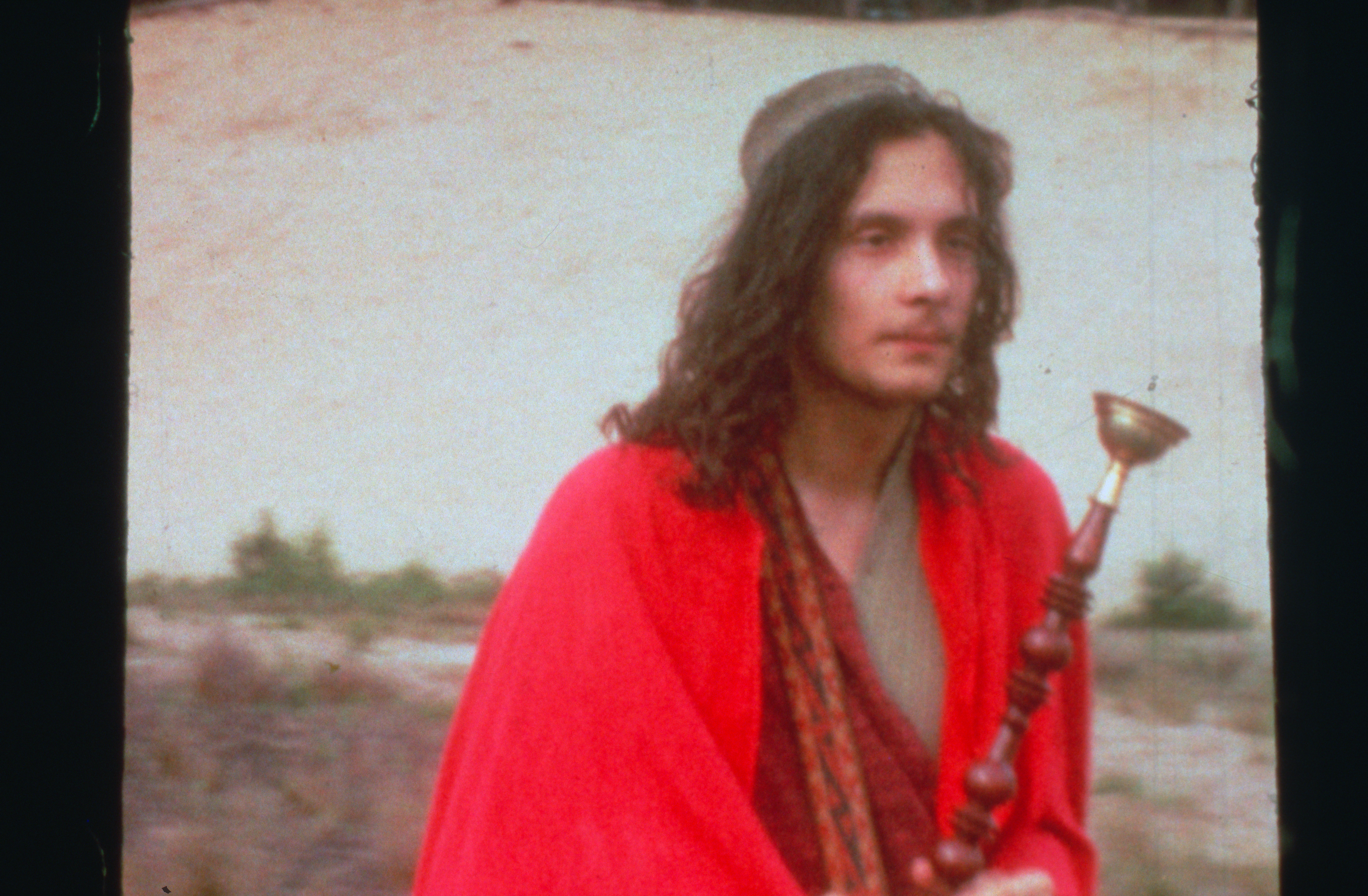 Matthias Sesselmann als Kiffer mit Wasserpfeife im Jahr 1972 in einer Kiesgrube bei Winsen (Luhe) vor seiner Zeit als bekennender Christ ...